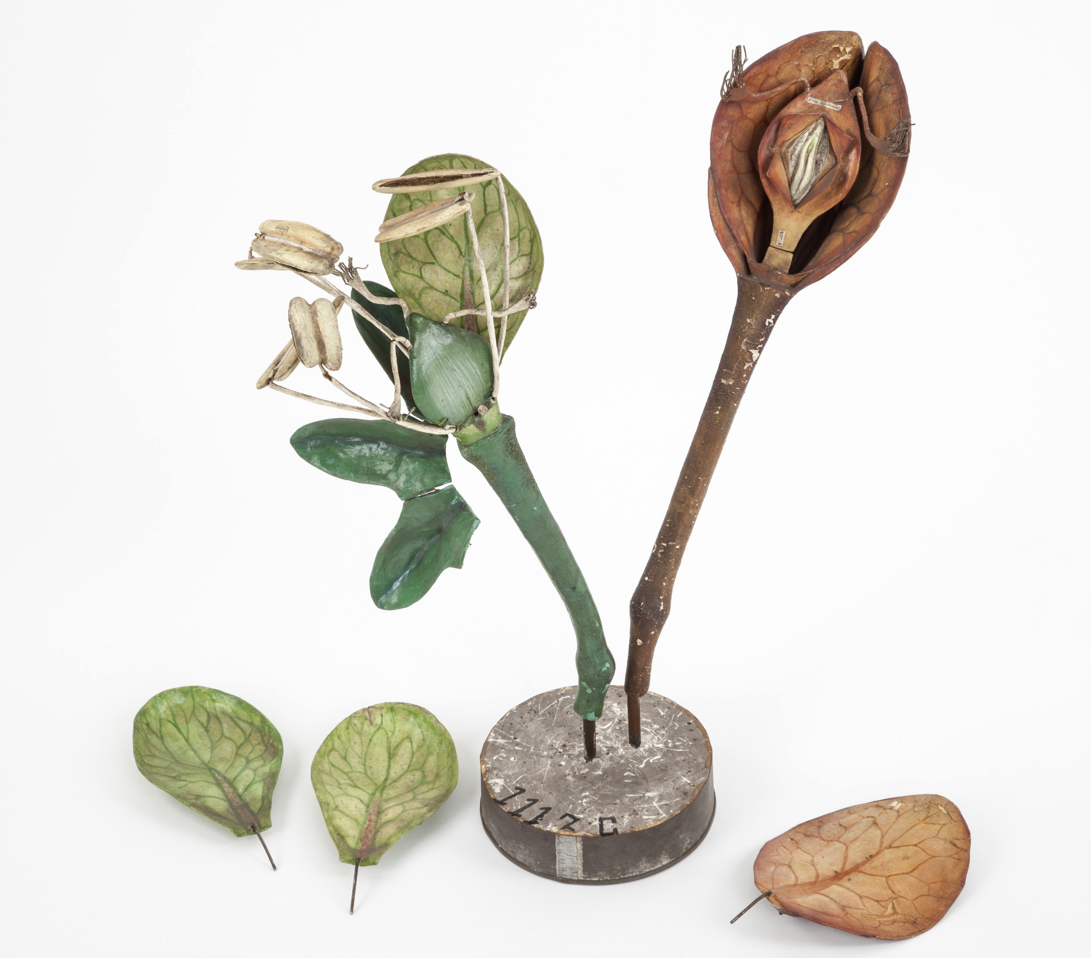 Fleurs et graine de Rumex. Modèle pédagogique en papier mâché du Dr. Auzoux. 1877 Conservé eu Musée national de l'Education - Rouen